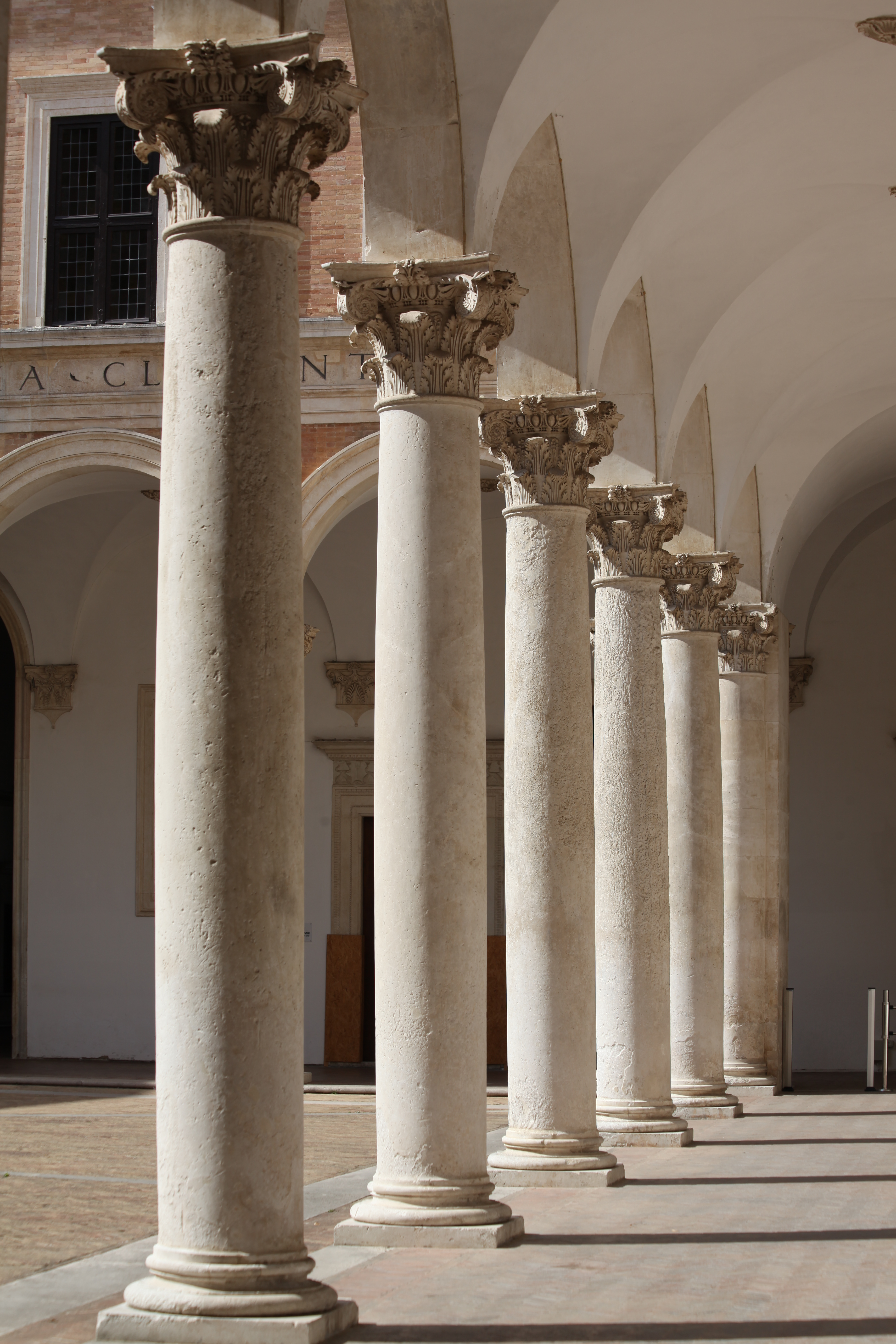 Palazzo Ducale di Urbino - Galleria Nazionale delle Marche - MIBAC This is a photo of a monument which is part of cultural heritage of Italy.